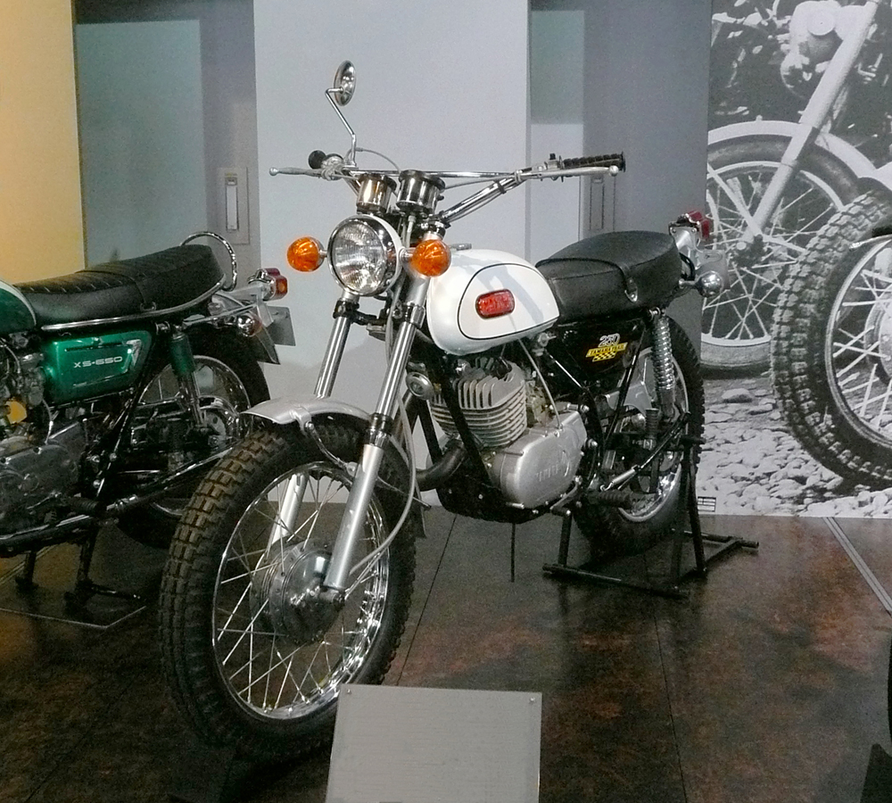 ヤマハ・DT-1、ヤマハコミュニケーションプラザにて撮影